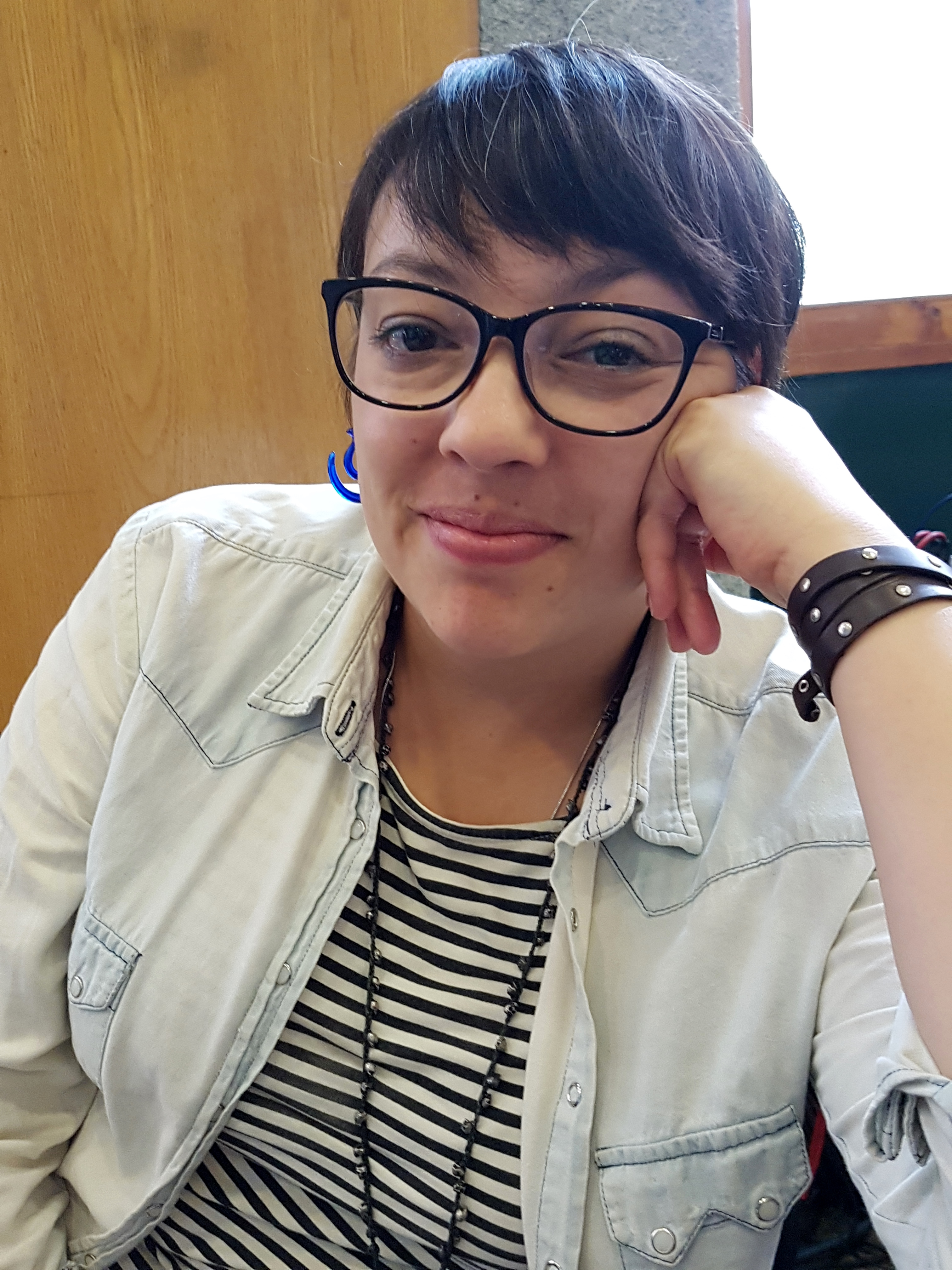 La escritora brasileña Natalia Borges Polesso en la Feria Internacional del Libro de Santiago 2017.